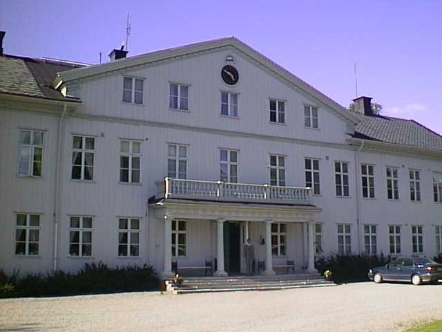 Herrenhaus Uddeholm, Manorhouse Uddehom, Sweden